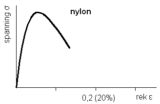 Spanning_rek_diagramma_nylon.PNG zelf, autoCAD+paint MADe 20 jun 2005 10:27 (CEST)